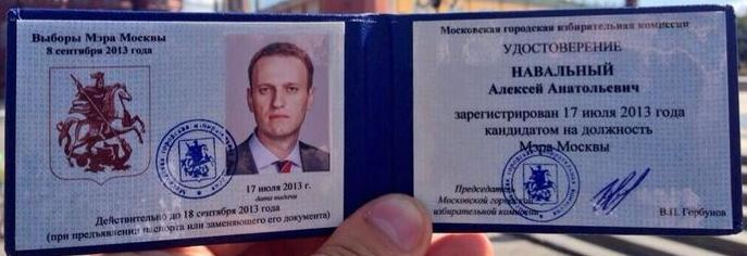 Удостоверение кандидата на должность Мэра Москвы от партии РПР-ПАРНАС Алексея Анатольевича Навального